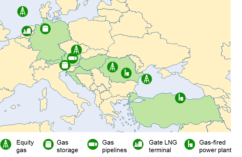 OMV Downstream Gas Portfolio